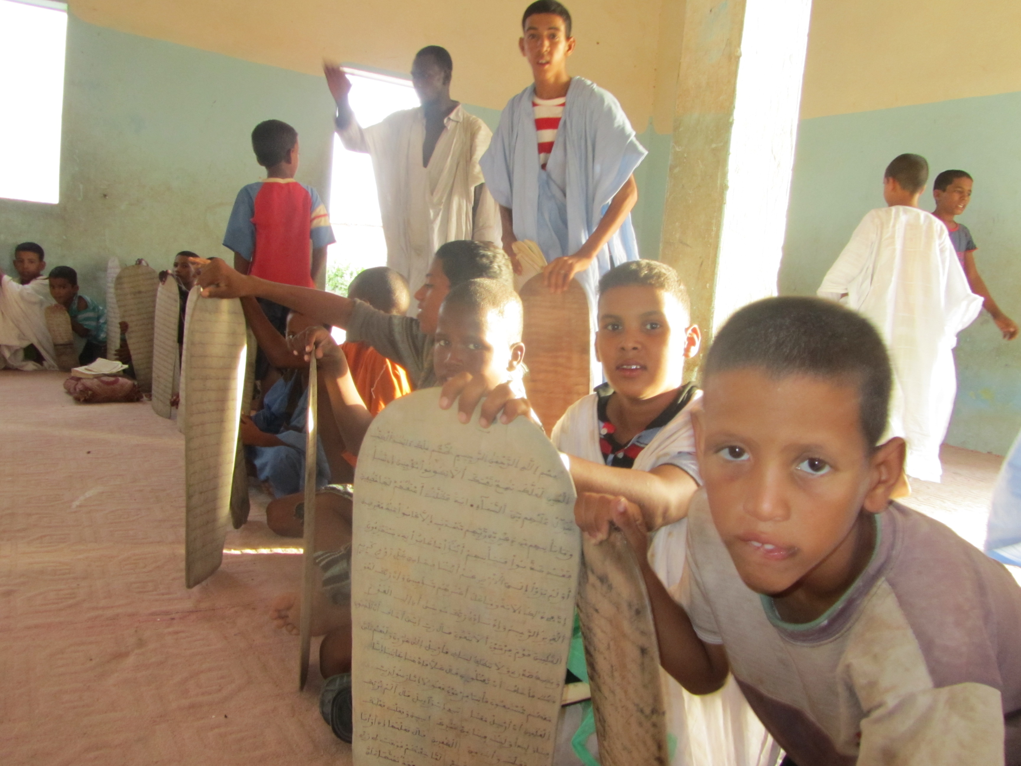 [Jemal Oumar] After returning from Saudi Arabia, Younis al-Mauritani attended the local al-mahdhara. بعد عودته من السعودية، التحق يونس الموريتاني بالمحظرة المحلية Après être revenu d'Arabie Saoudite, Younis Le Mauritanien a fréquenté l'al-mahdhara locale.